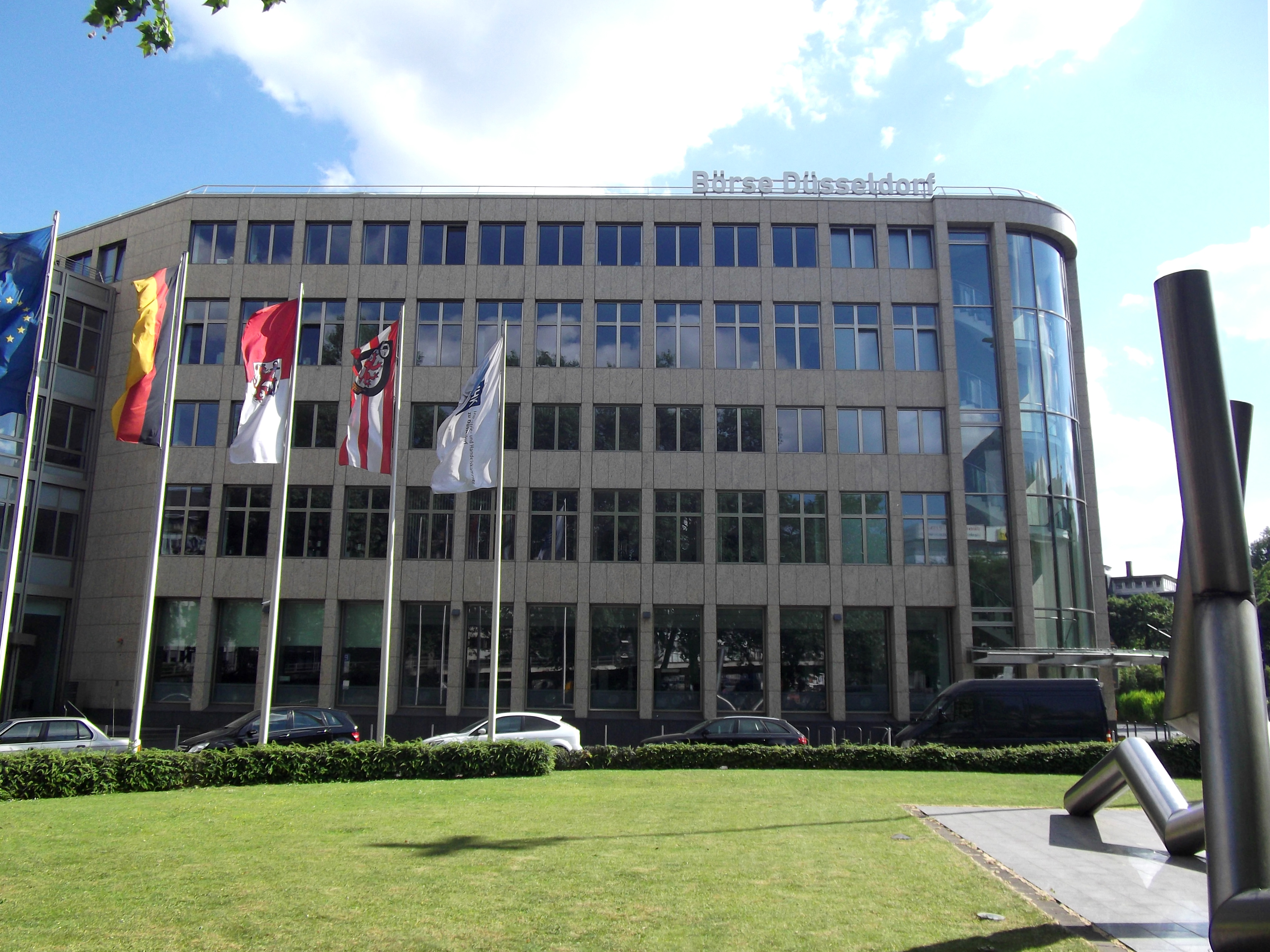 Düsseldorf, Germany: Ernst-Scheider-Platz: IHK und Börse Düsseldorf mit Stahl-Skulptur von Erich Hauser (1931-2004)